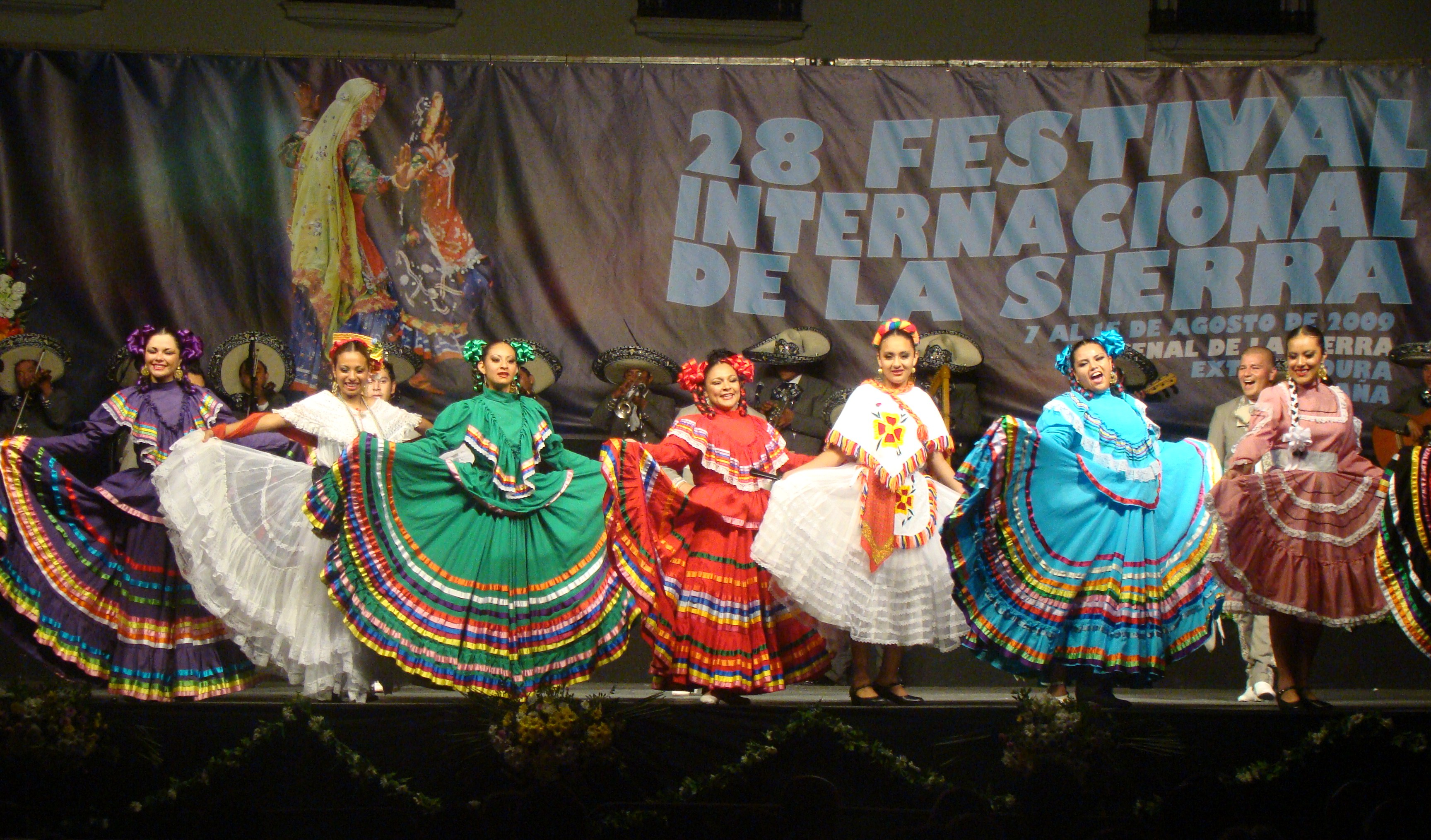 GRUPO MEXICACO